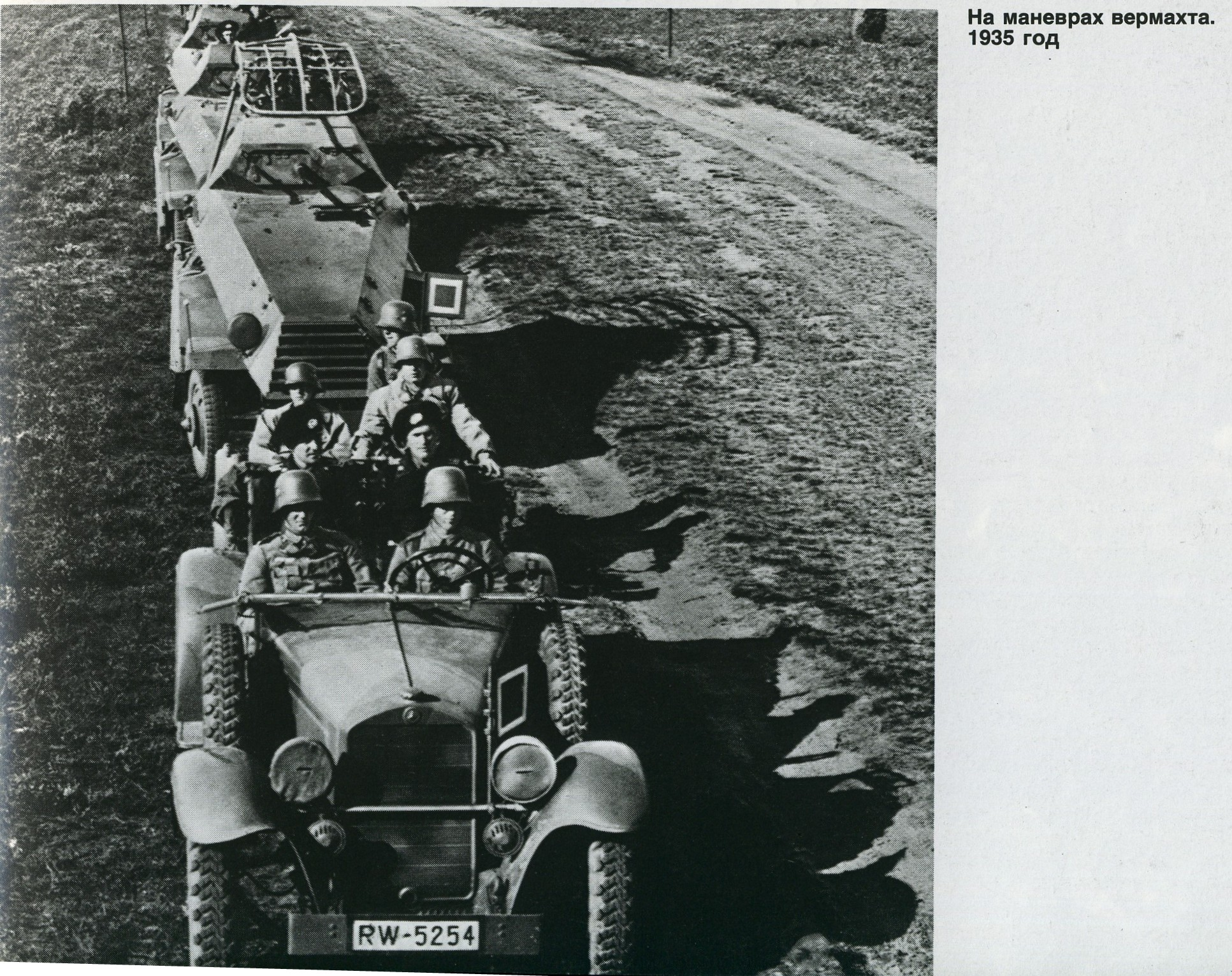 III Reich, 1935. First auto - Mercedes(?), second - SdKfz 231.